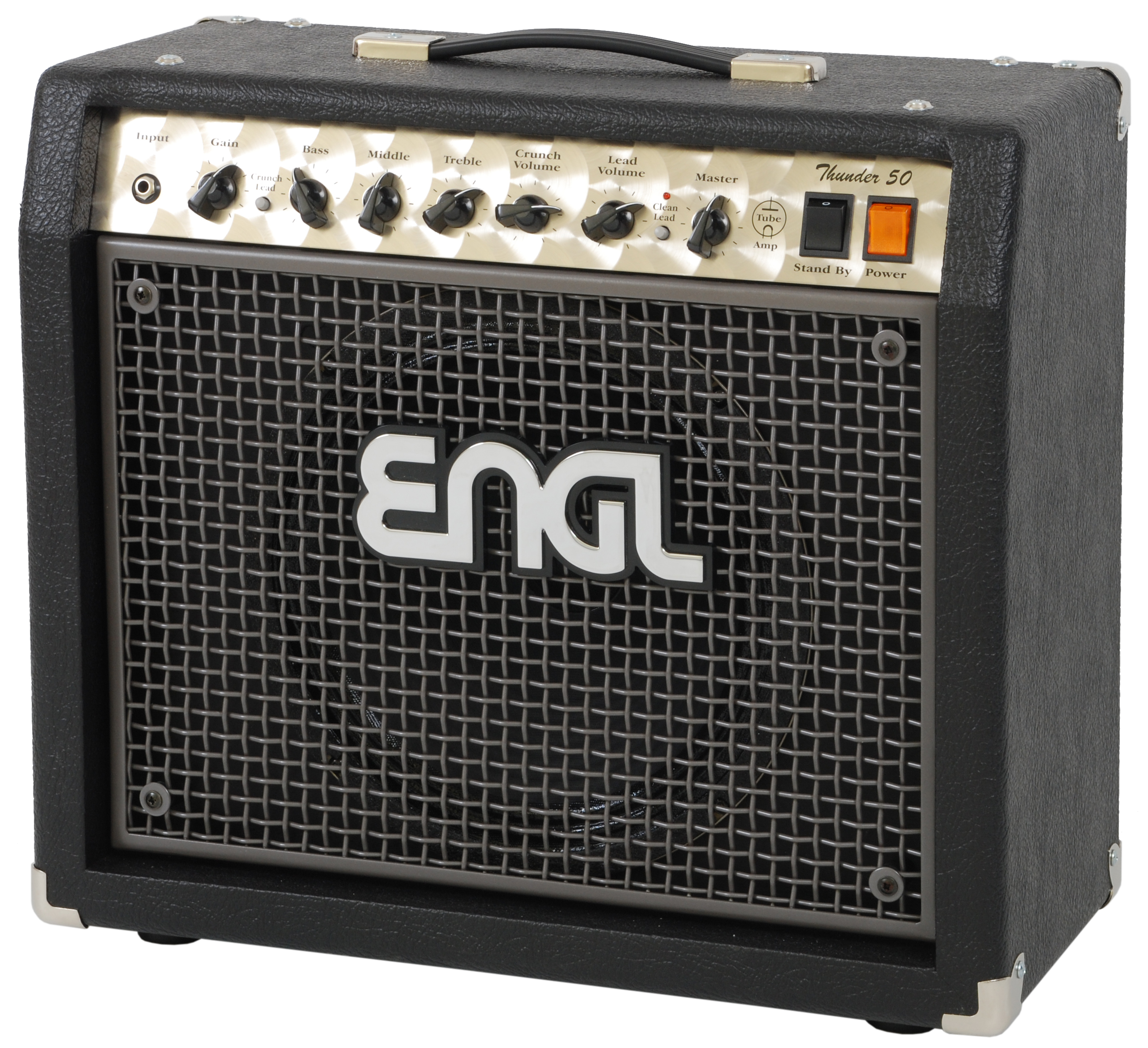 Wzmacniacz gitarowy E322 Thunder Combo 50 Drive S.Moffatt firmy Engl